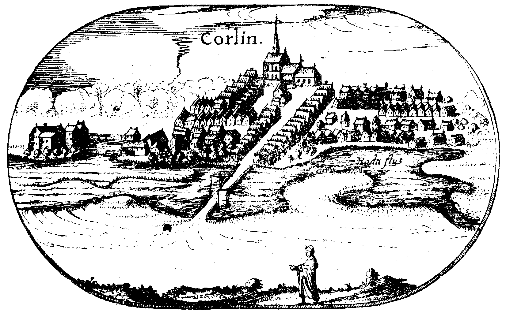 Rycina miasta Karlino z mapy Lubinusa - Mapa księstwa pomorskiego z 1618 roku.